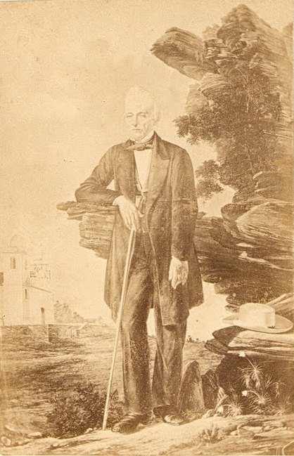 Líder político, Fidalgo do Imperio, Criador da raça Mangalarga Marchado e cabeça da mais importante Família da Aristocracia Rural Brasileira.